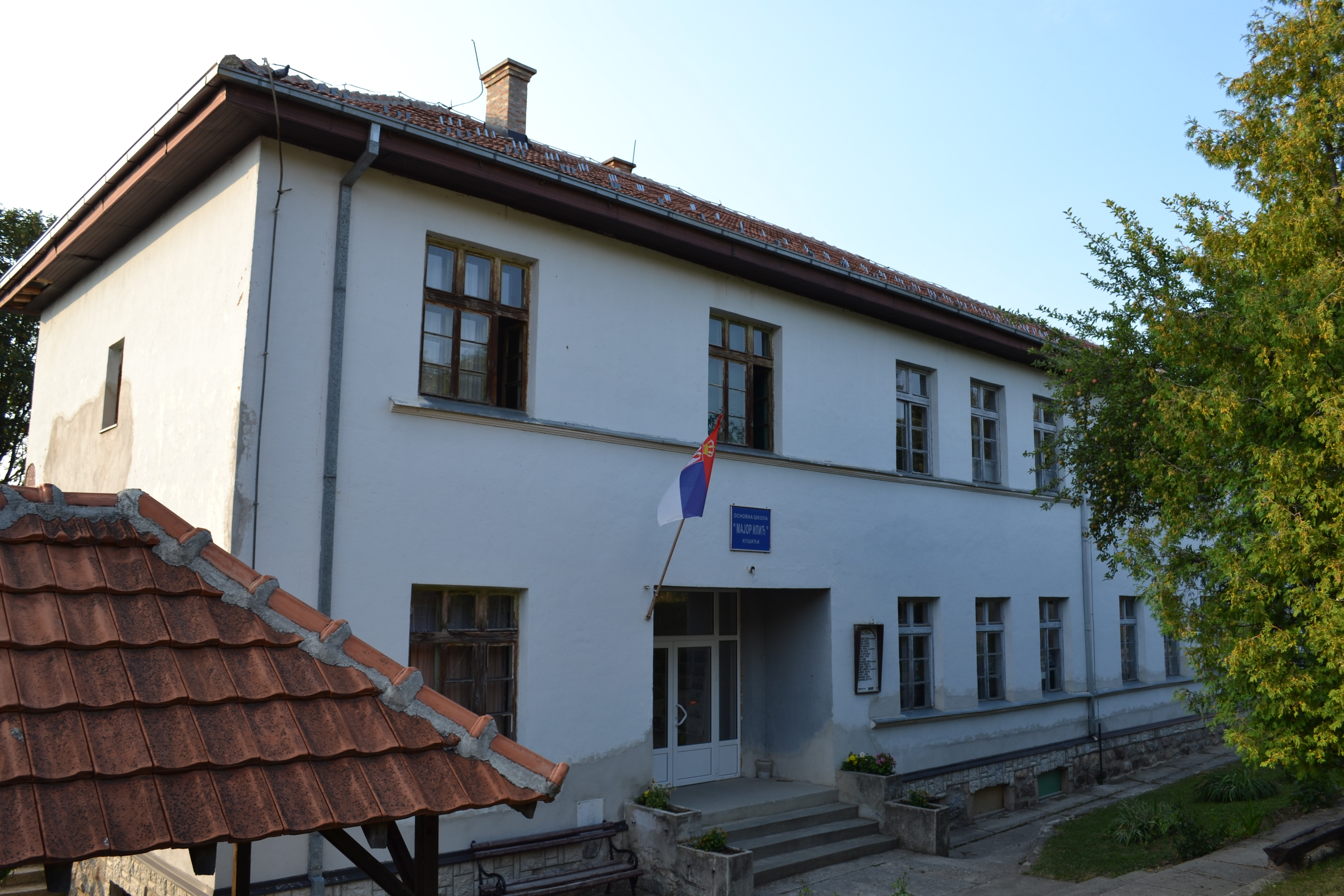 OŠ Major Ilić Kušići